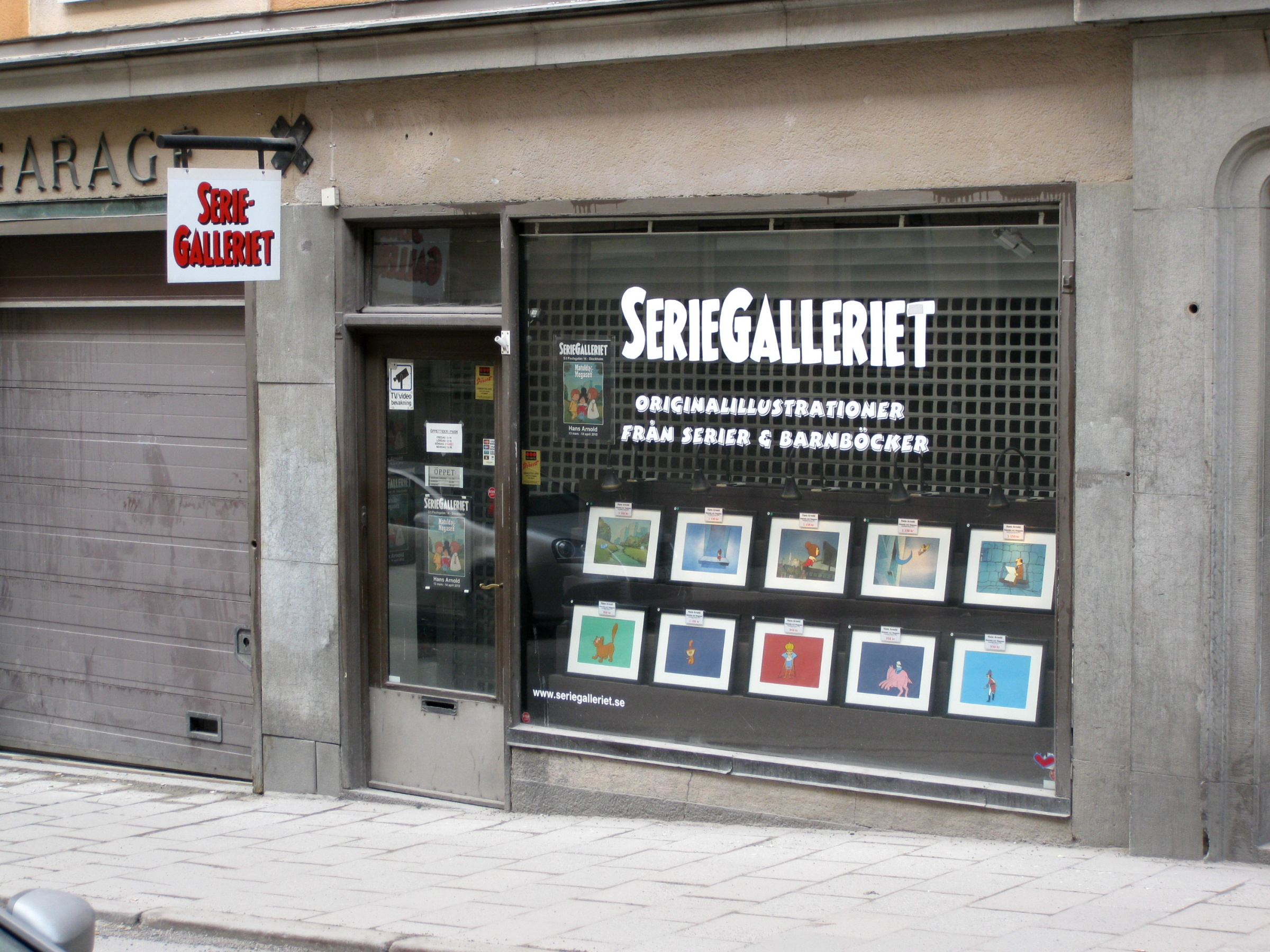 Seriegalleriet, Sankt Paulsgatan 14, Södermalm, Stockholm.